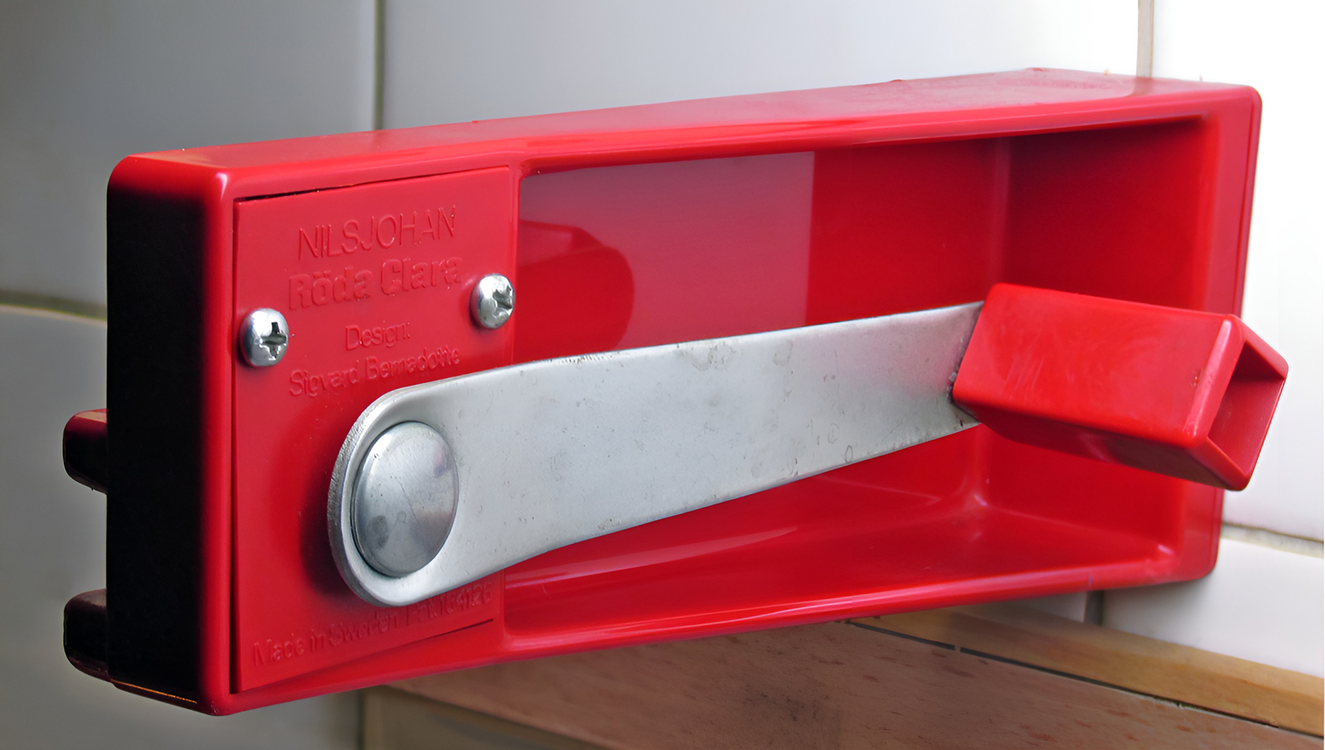 En Röda Clara monterad på köksvägg.